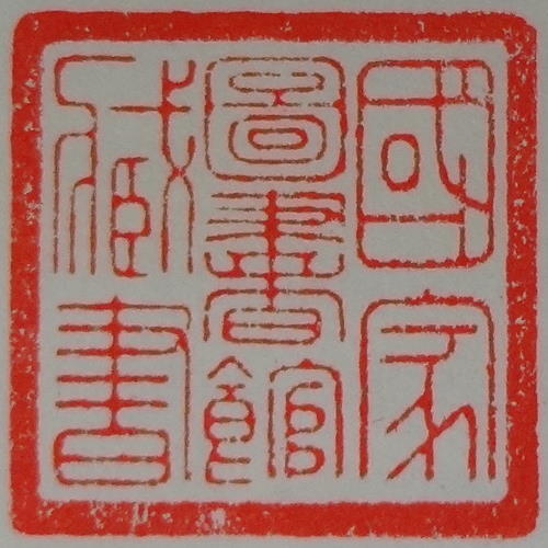 2009年中華民國國家圖書館藏書章，蓋印於書名頁。